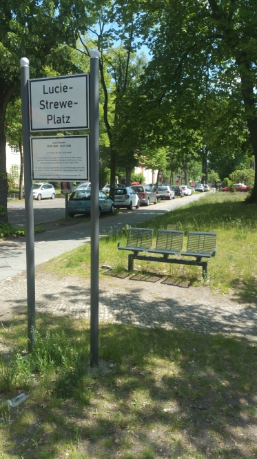 Der zuvor unbenannte dreieckige Platz an der Mündung von Busseallee auf die Fischerhüttenstraße wurde 2018 benannt. Er liegt etwa 50 Meter vor der Sven-Hedin-Straße (Sven-Hedin-Platz). Er liegt im Ortsteil Zehlendorf des Berliner Bezirks Steglitz-Zehlendorf und gehört zum Planungsraum (Kiez) Fischerhüttenstraße.